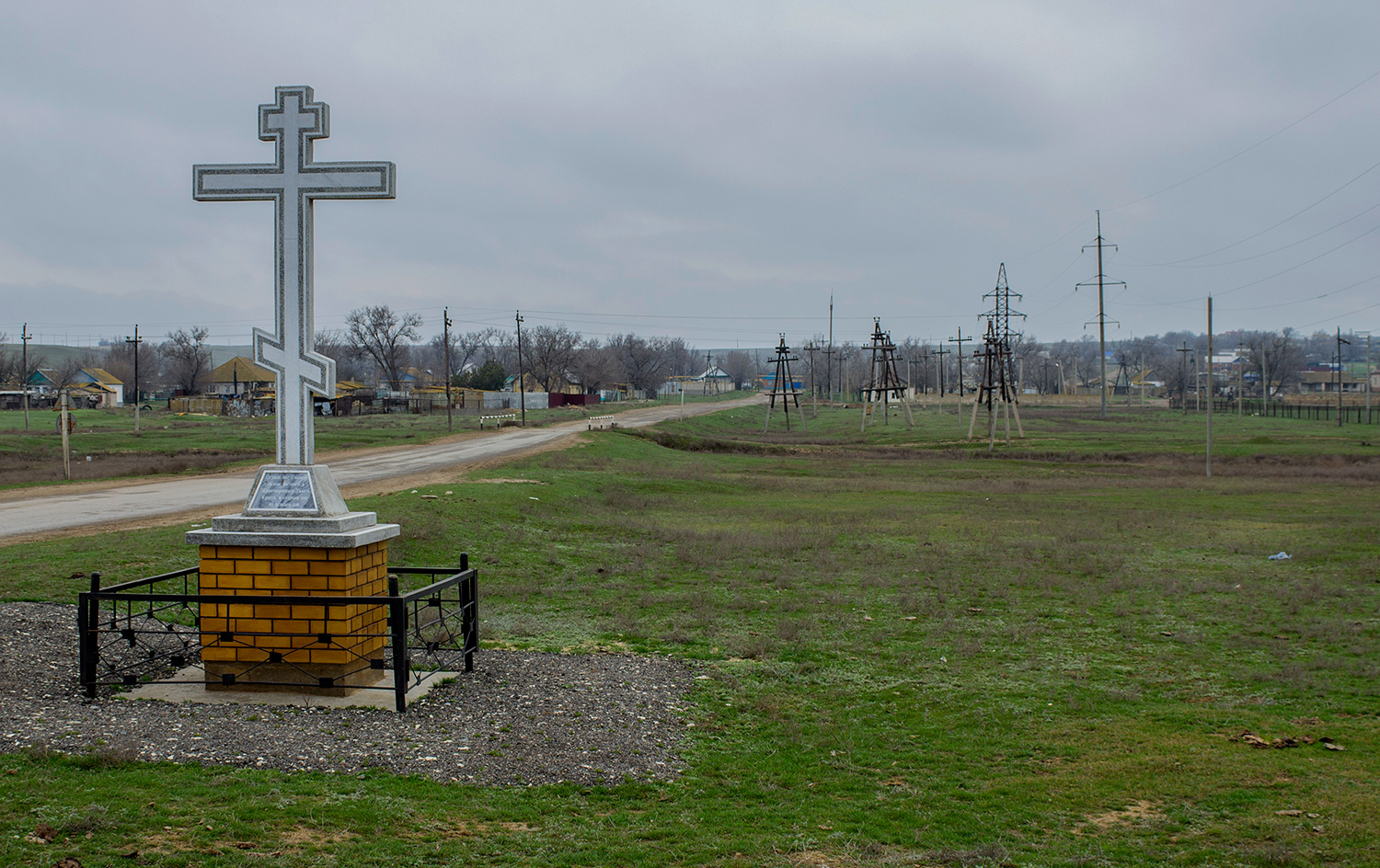 Поклонный крест на въезде в село Вознесеновка